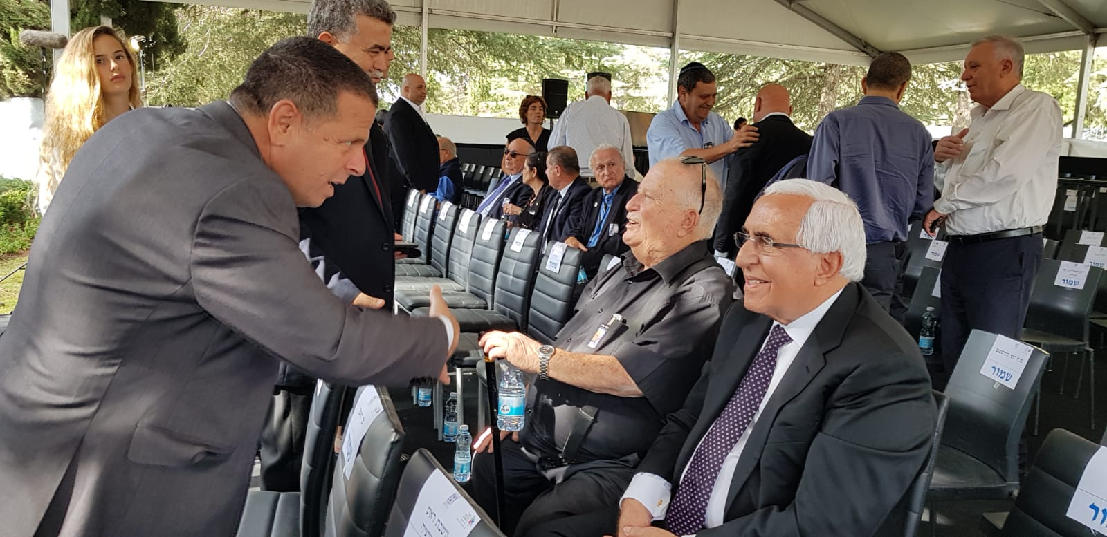 איתן כבל עם עמיר פרץ והשרים לשעבר בייגה שוחט ומשה שחל, באזכרה הממלכתית לראש הממשלה יצחק רבין ז"ל, 2018